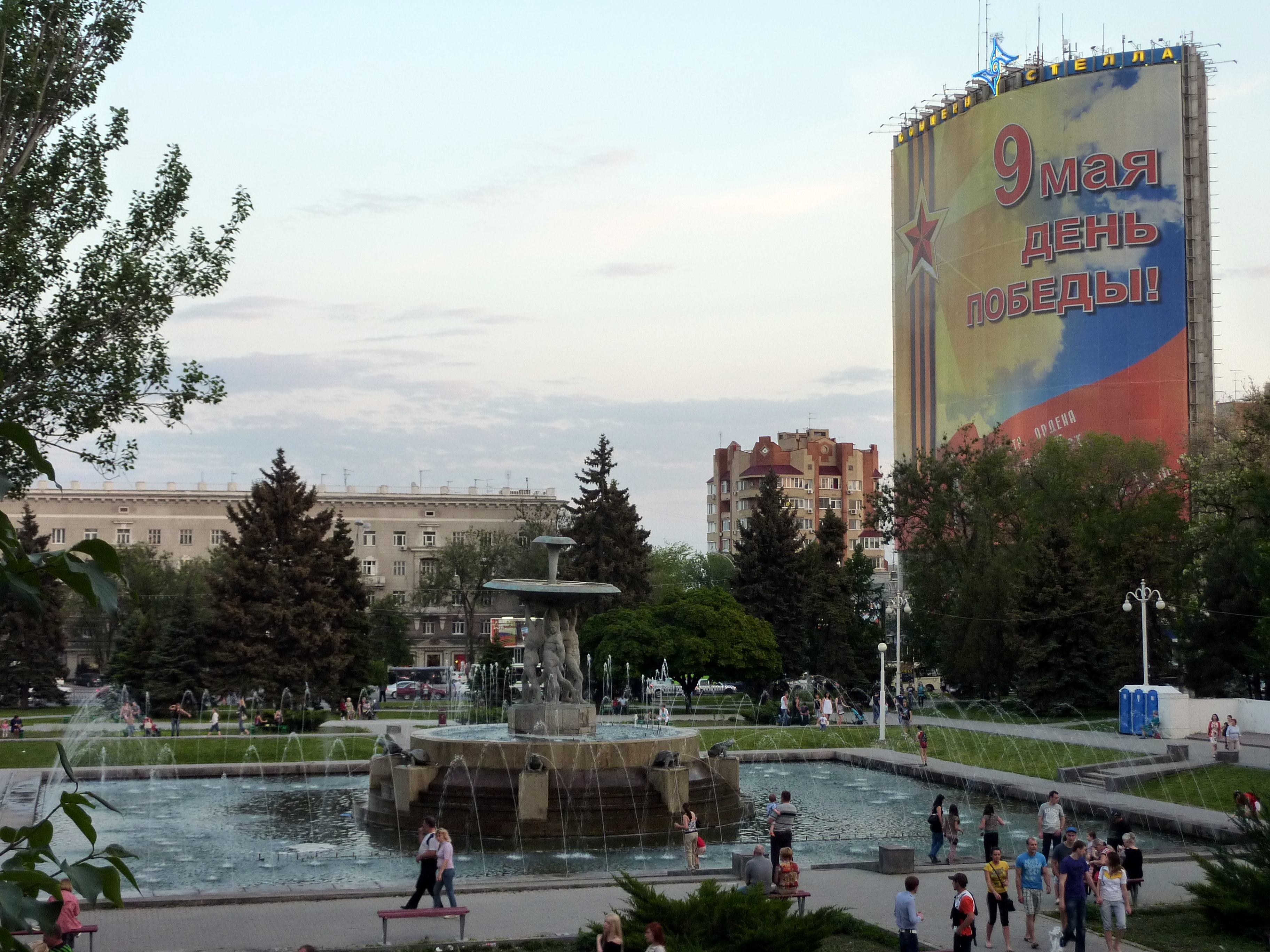 Фонтан на Театральной площади (вид с северо-востока)